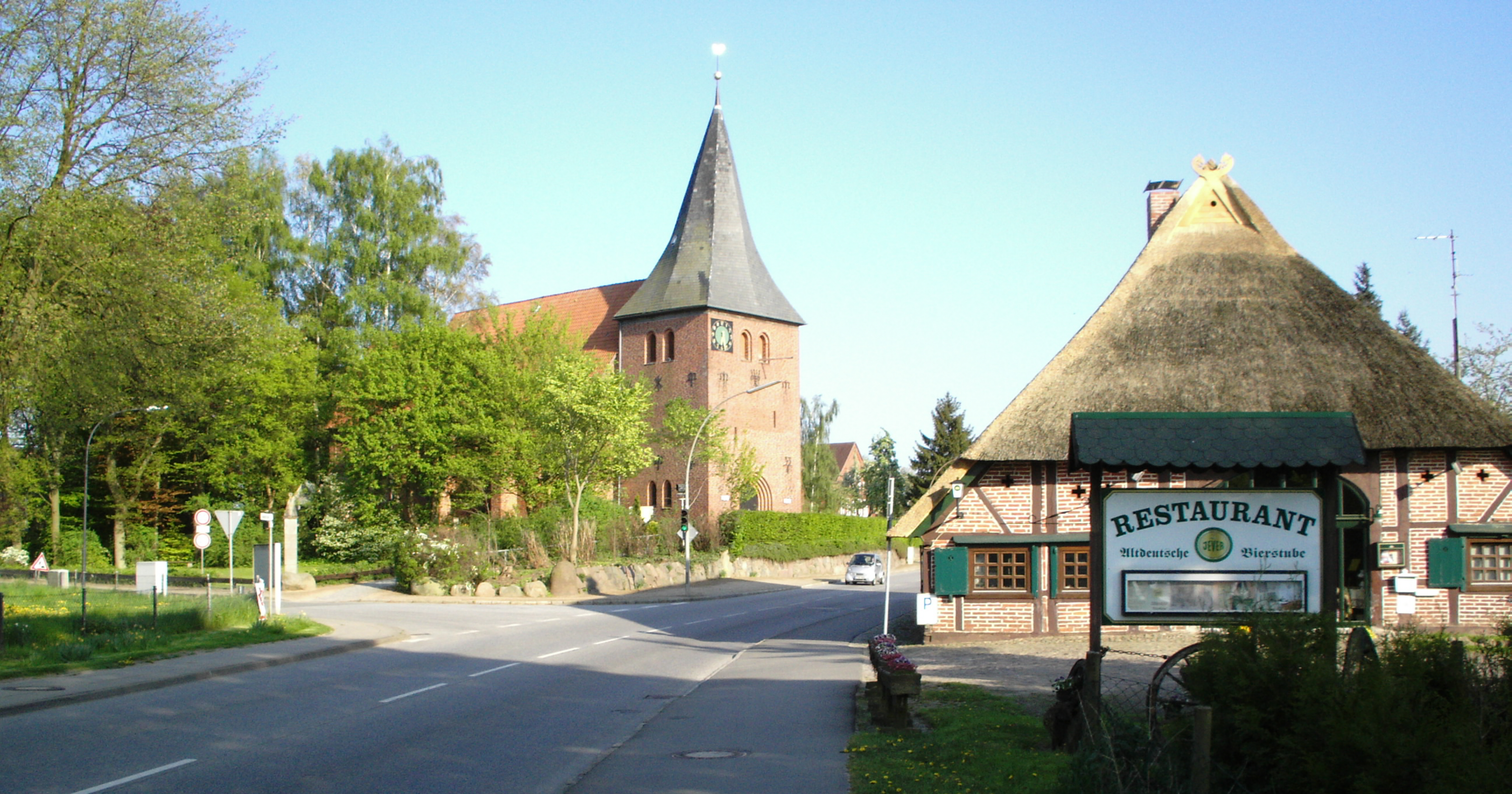 Groß Grönau, Blick von Norden auf die Willehadkirche